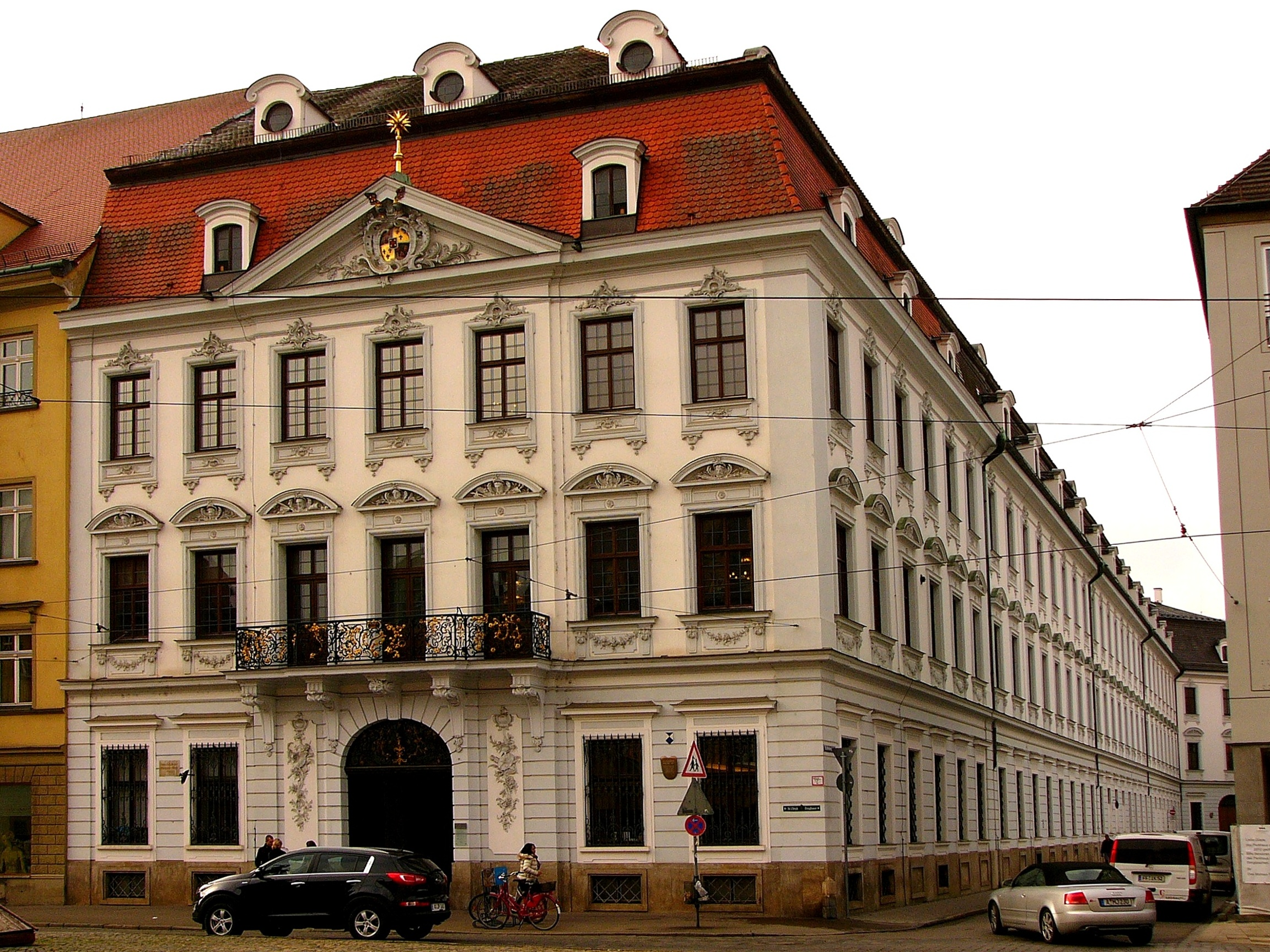 Schaezler-Palais, jetzt Deutsche Barockgalerie, dreigeschossiger Mansarddachbau mit langgestrecktem Seitenflügel entlang der Katharinengasse, repräsentative Fassade zur Maximilianstraße mit flachem, giebelbekröntem Mittelrisalit und reichem Rokoko-Stuckdekor, Gartenkolonnade, für den Bankier Benedikt Adam von Liebert errichtet, von Johann Gottfried Stumpe nach Plänen von Karl Albert von Lespilliez, 1765–70; mit Ausstattung; Brunnenhof, wohl gleichzeitig.This is a photograph of an architectural monument.